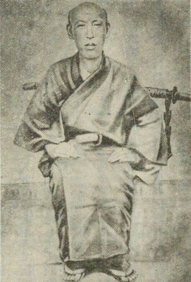 牧野権六郎成憲